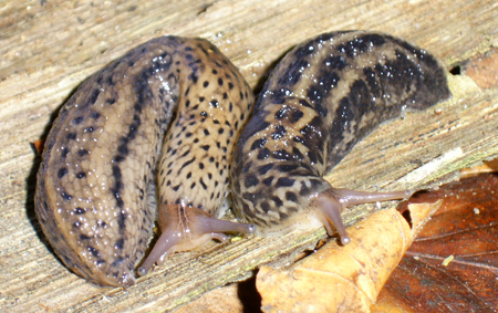 Слизняк великий звичайний, слизняк великий Limax maximus Linnaeus, 1758